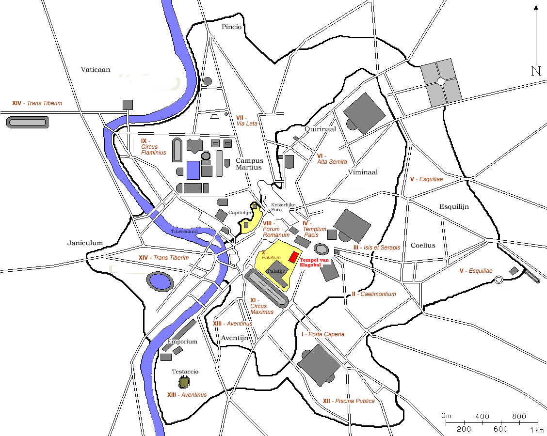 Kaart van antiek Rome waarop het Tempel van Elagabal is uitgelicht. Kaart is afkomstig van FR:wiki en door mij naar een Nederlandse versie bewerkt. Auteurs: nl::fr:User:ColdEel en Gebruiker:Joris1919